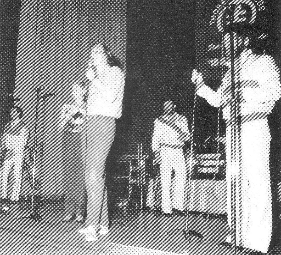 100 Jahre Pelzveredlung Thorer & Co, 1983. Jubiläumsveranstaltung für Betriebsangehörige und Mitarbeiter im Frankfurter Zoo-Gesellschaftshaus. Mike Krüger singt sein „Nippel-Lied“.